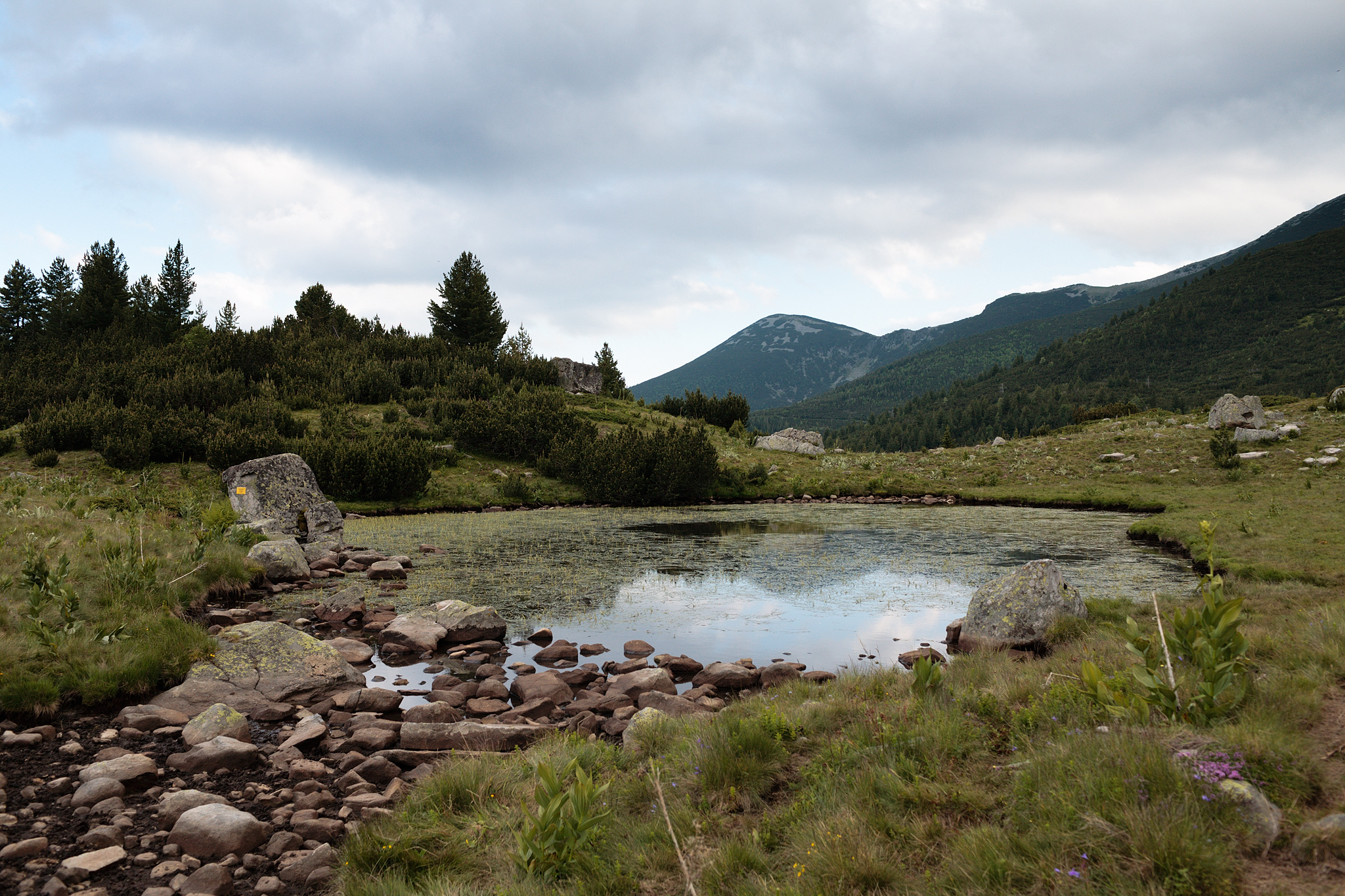 Пирин, Пирин, Долното Брезнишко езеро (Сухото гьолче)